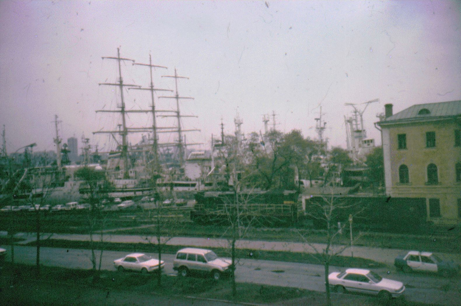 Владивосток, осень 1994 года.